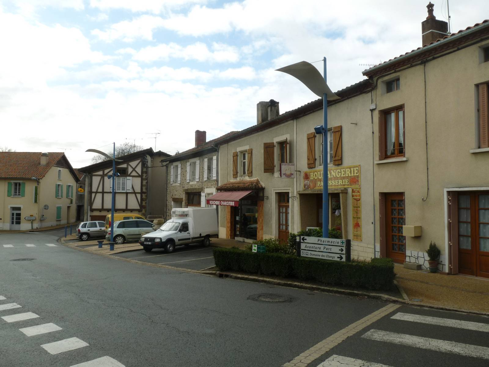 place de Massignac, Charente, France